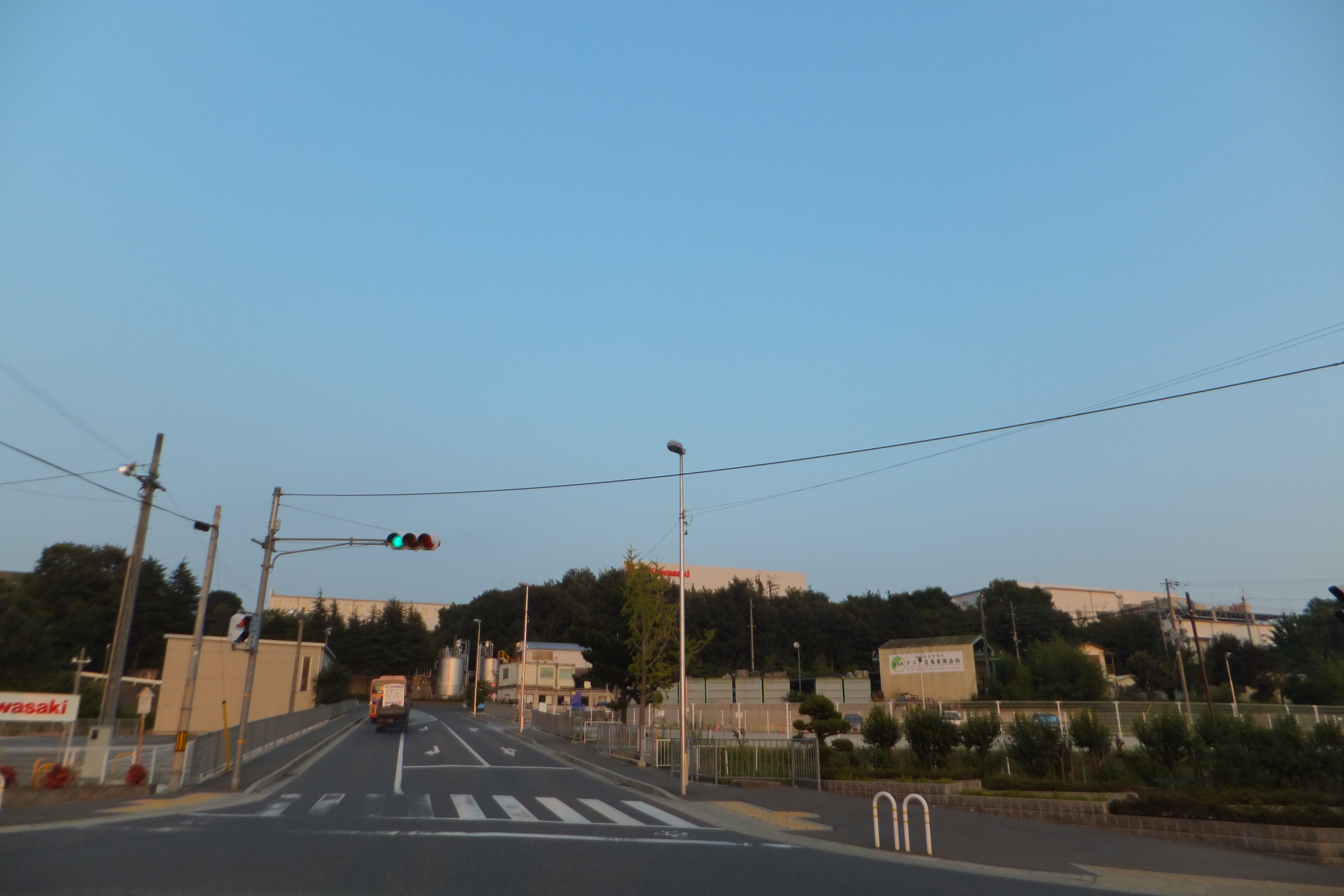 川崎重工業西神戸工場